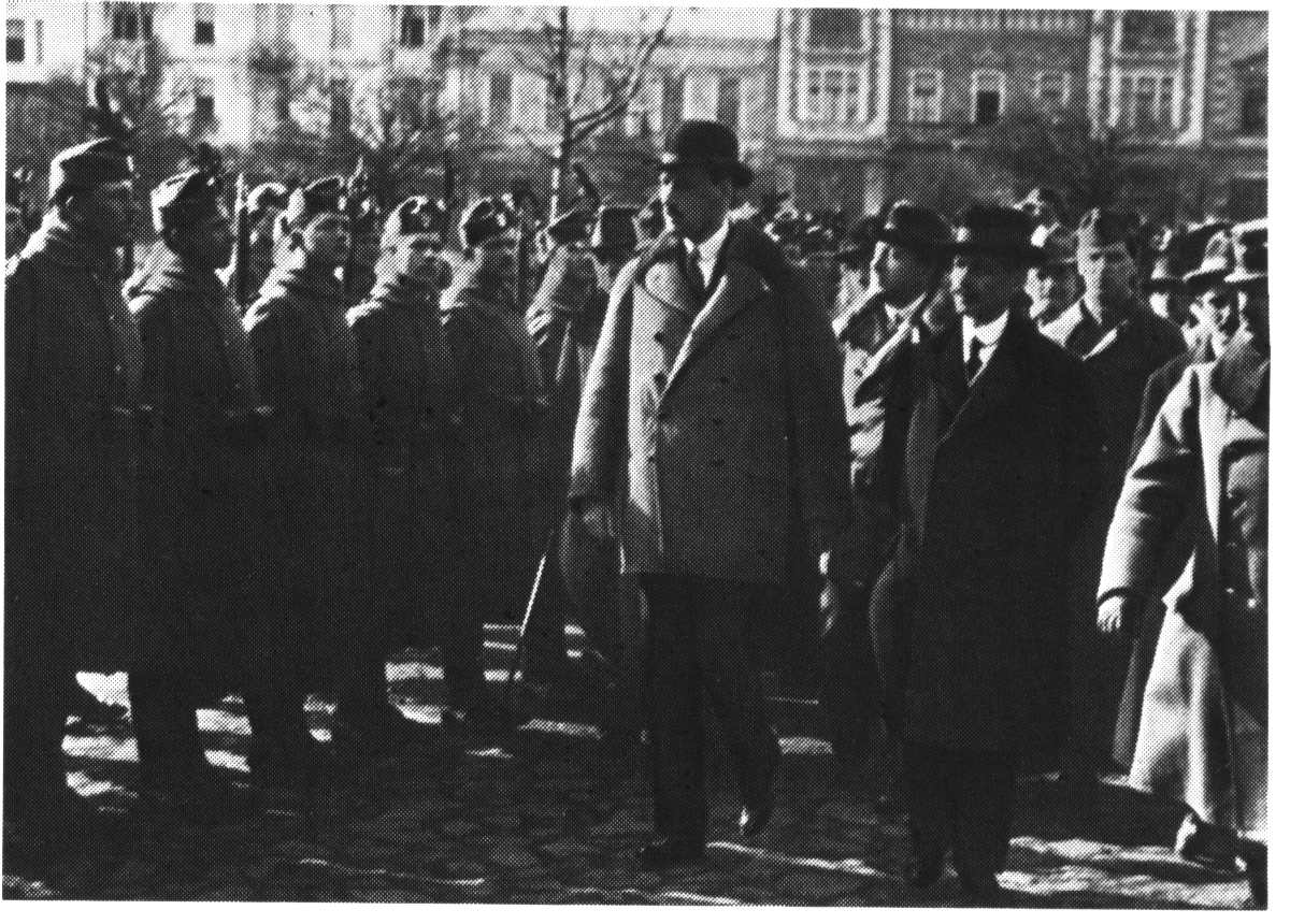 Károlyi Mihály inspectând trupele Diviziei Secuiești